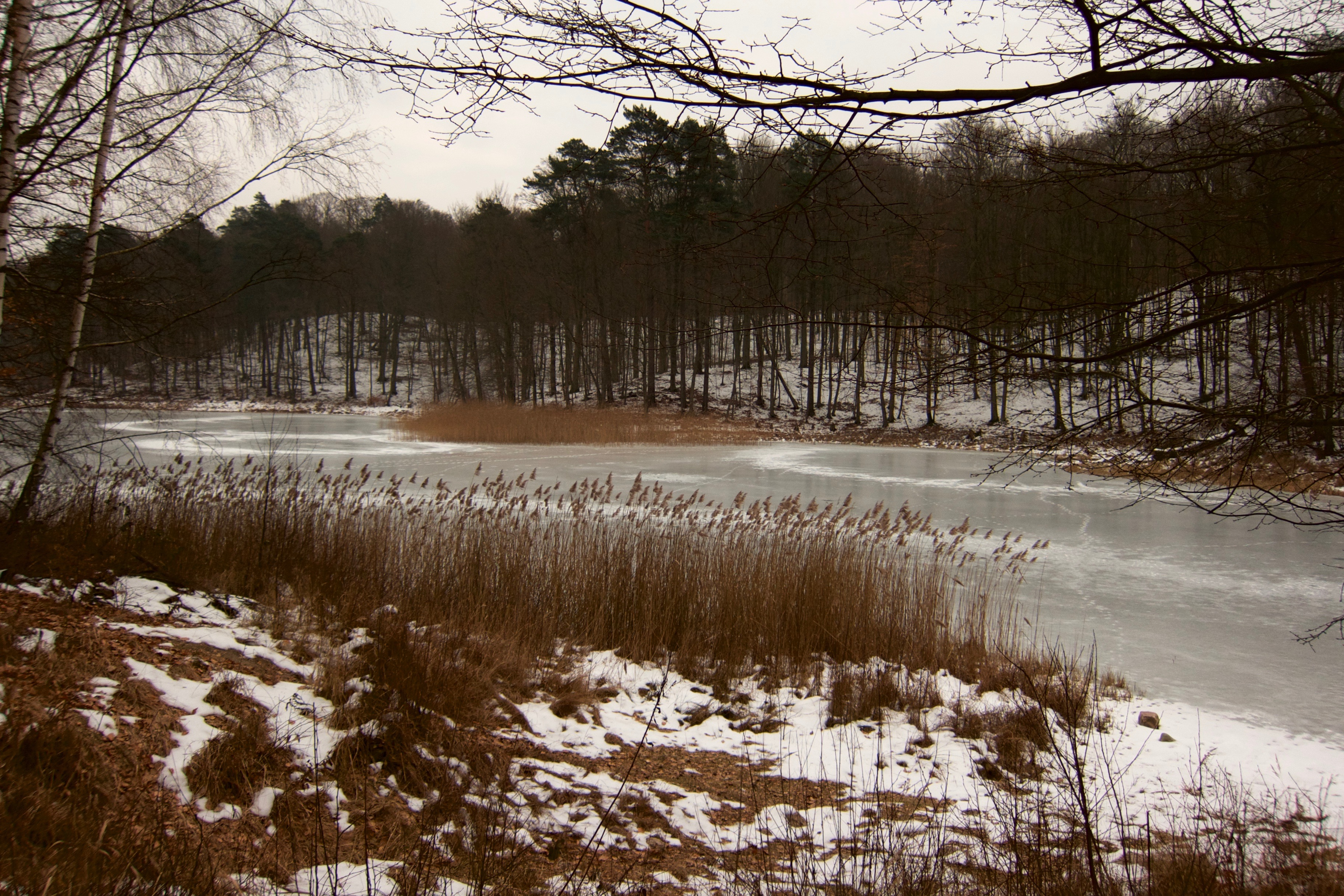 Vereister Blumenthalsee Naturschutzgebiet Blumenthal.